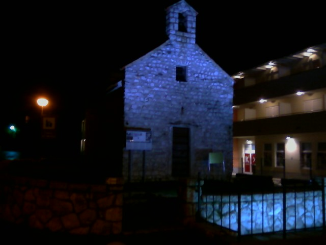 Arheološki lokalitet kraj crkvice svetog Marka u Baški na otoku Krku.